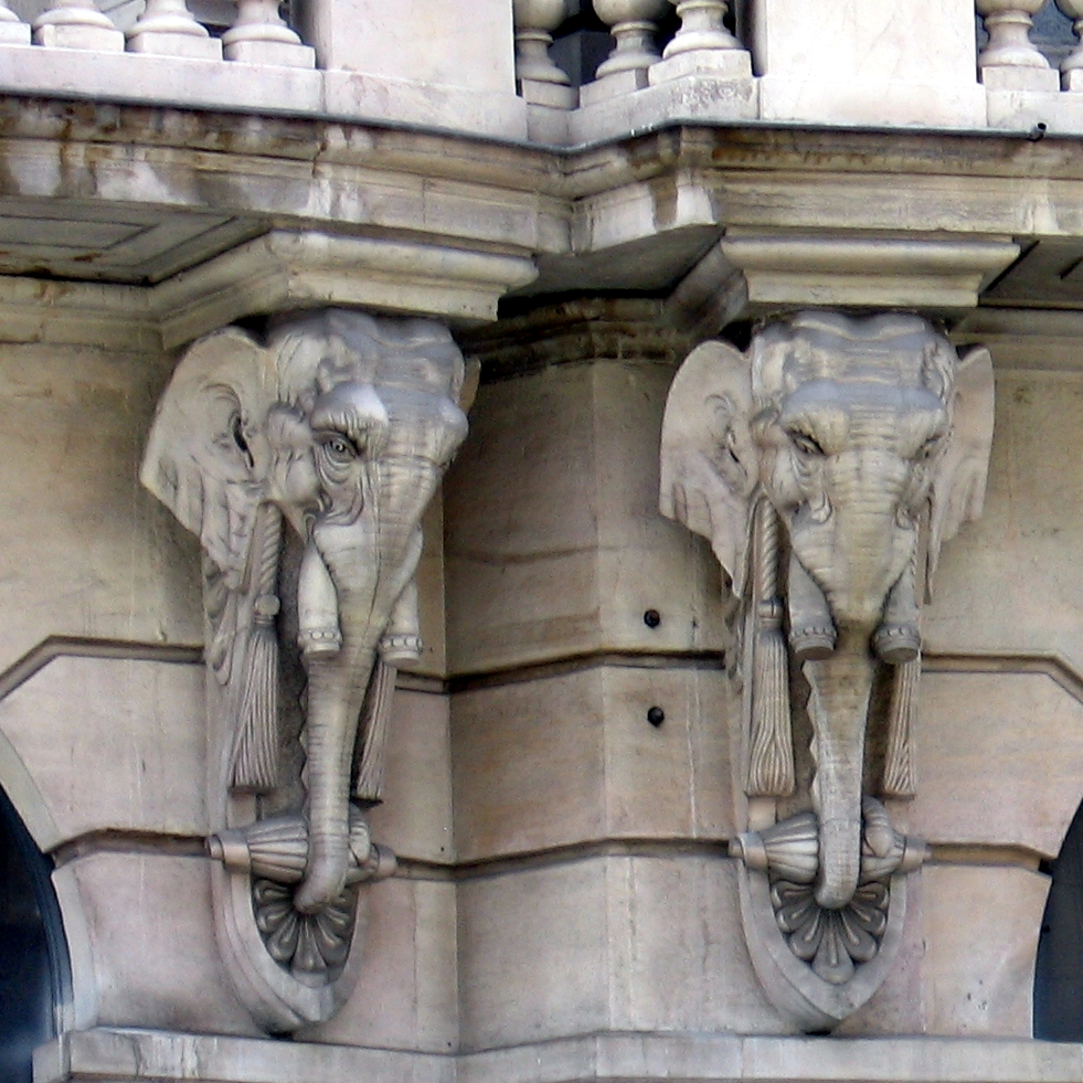 Elephant corbels on the Palacio de la Equitativa, Madrid